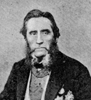 Ammiraglio e politico italiano, senatore e ministro del Regno d'Italia